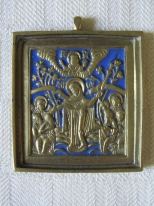 Музей: Мінскі абласны краязнаўчы музей Тып: выяўленчыя крыніцы Від: жывапіс Прадметнае імя: абраз Назва/аўтарская назва: "Маці Божая "Усіх Смуткуючых Радасць" Аўтары: невядомы; Матэрыялы: метал жоўты; эмаль; Тэхналогіі стварэння: ліццё; Дата стварэння: пачатак ХХ ст. Месца стварэння: Расійская Імперыя Памеры: 6,4 х 5,4 см